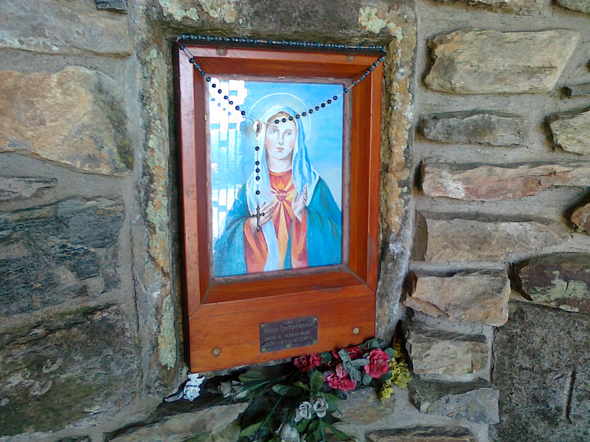 Obraz Niepokalanego Serca Maryi w kapliczce w miejscu o nazwie Vřesová studánka